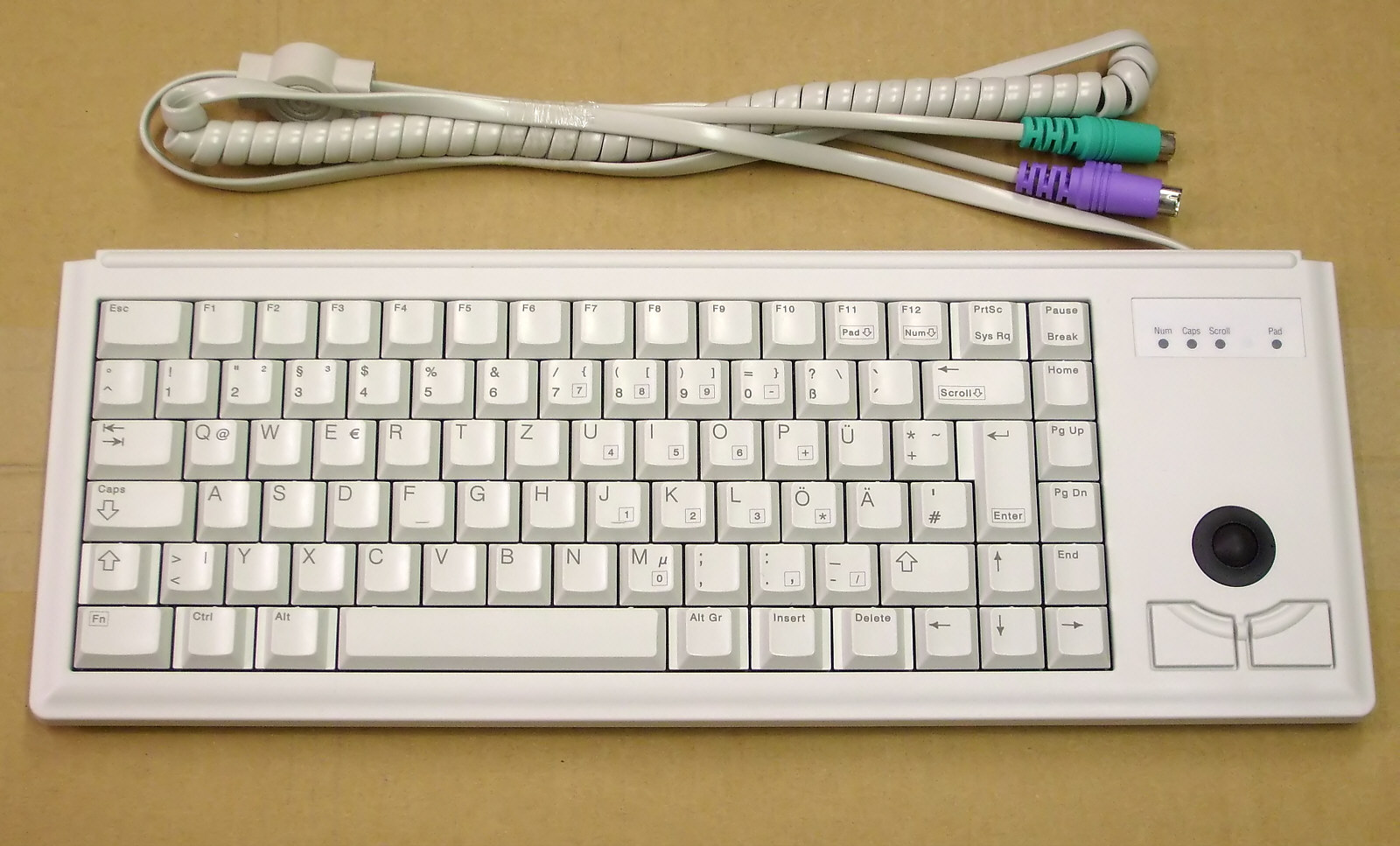 Kompakte PC-Tastatur mit integriertem Trackball als Mausersatz, PS/2-Anschlüsse